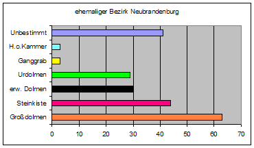 Neubrandenburg